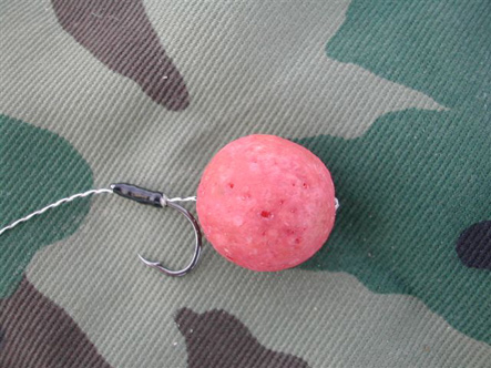 Hair Rig